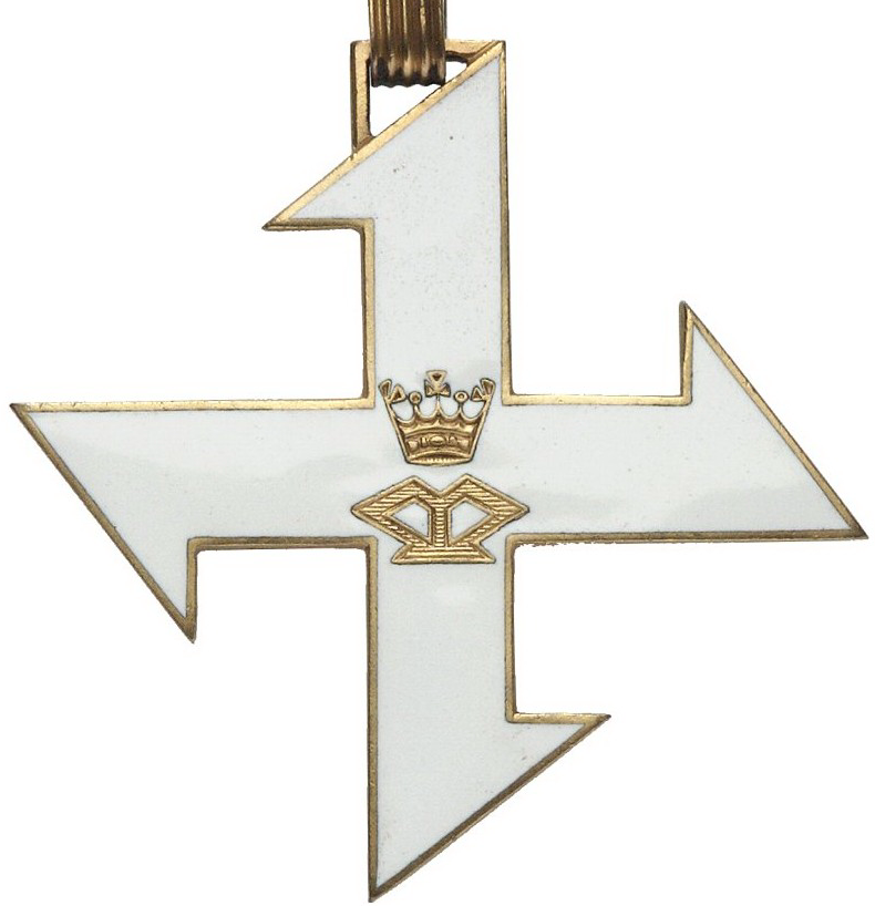 Crucea-Regina-Maria clasa I - revers Restrictii - fara restrictii finnd un insemn oficial al statului roman